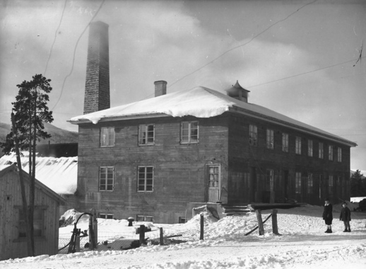 Meieribygget i Folldal, 1980